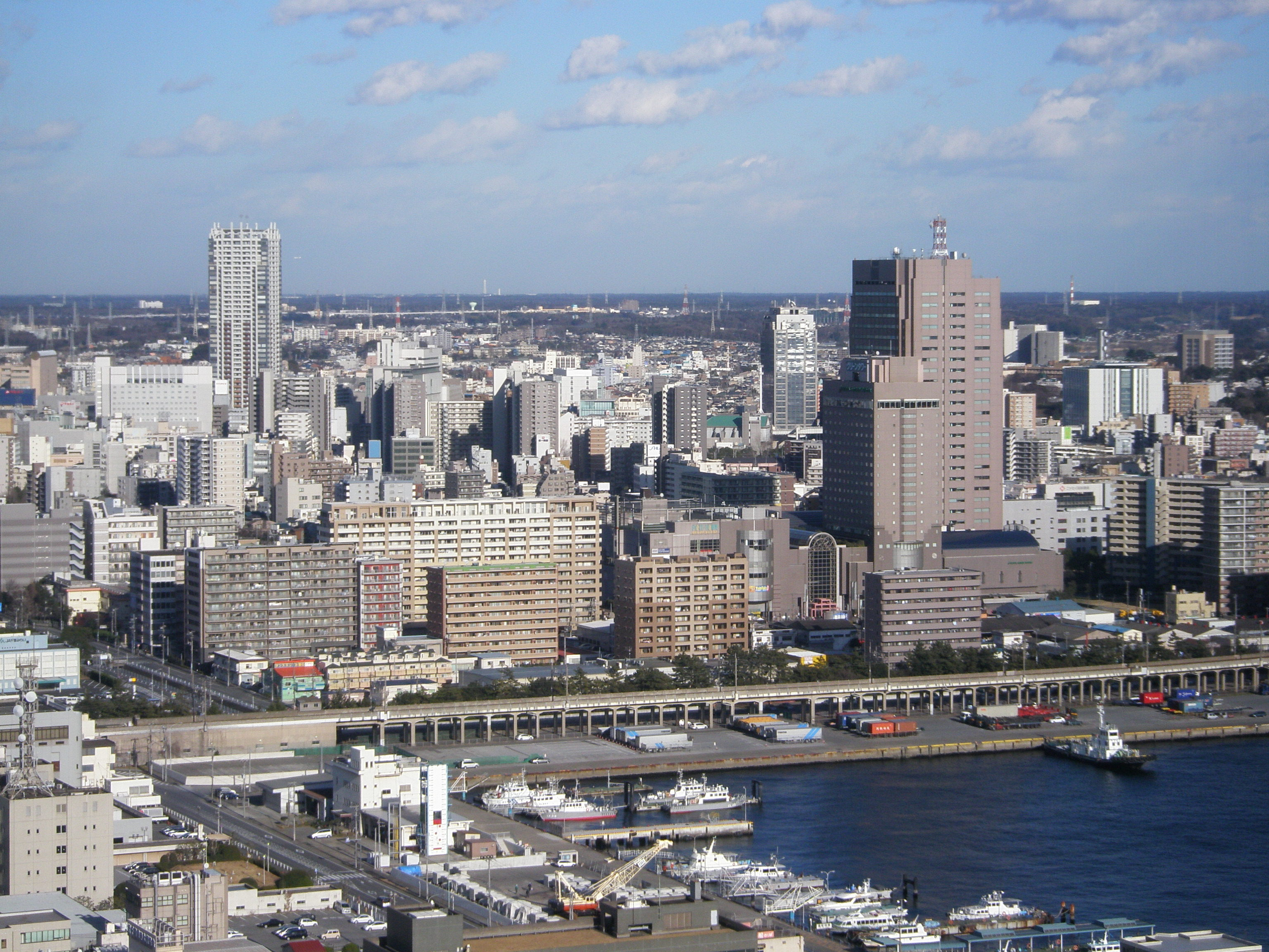 千葉ポートタワーから、千葉ポートスクエア、県庁方向